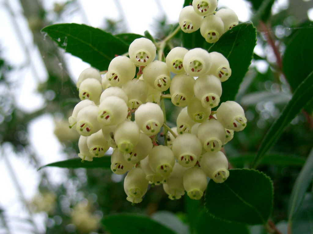 Westlicher Erdbeerbaum (Arbutus undeo)